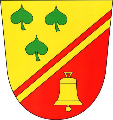 Prusice znak